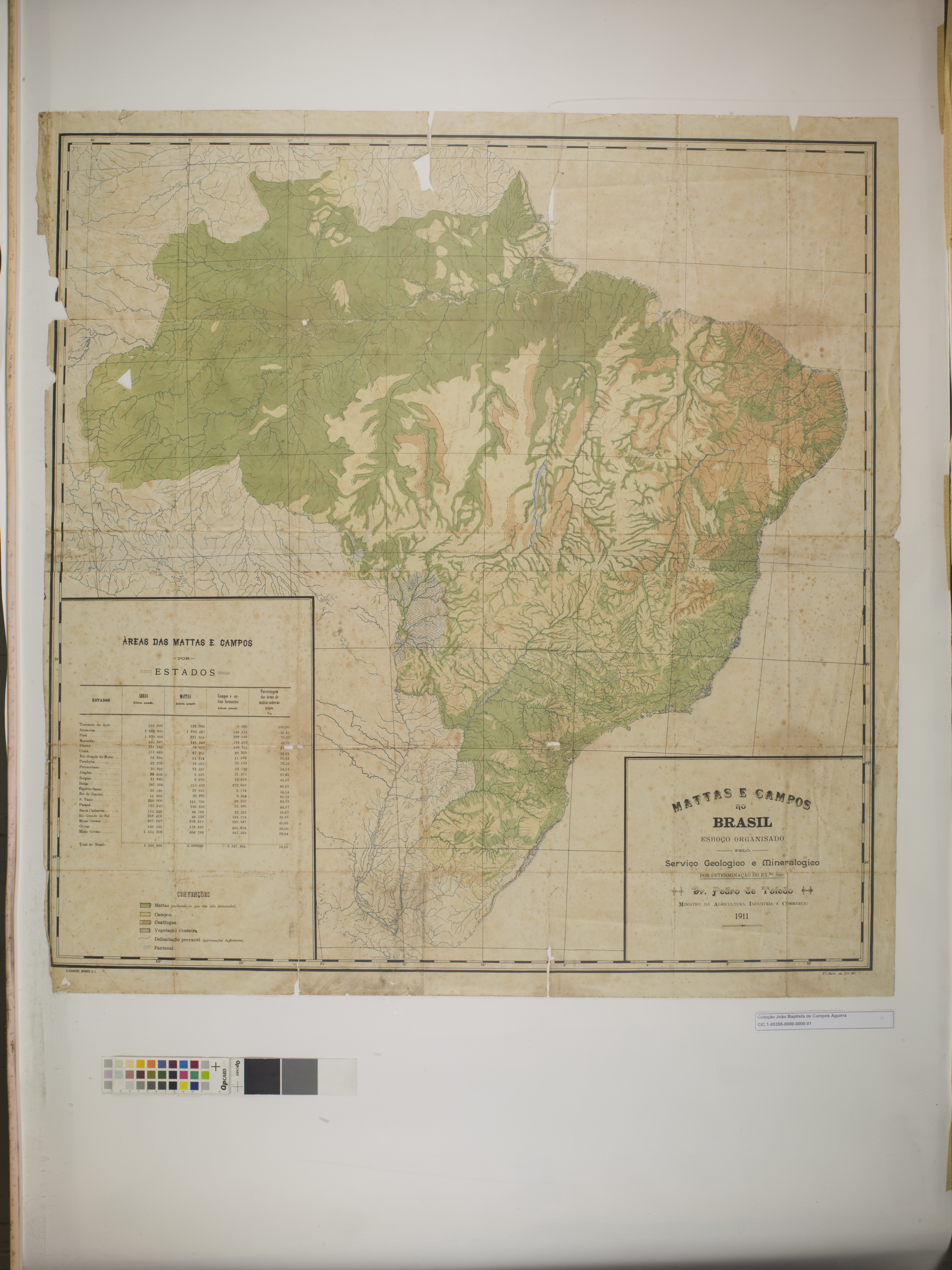 Obra que integra o acervo do Museu Paulista da USP. Coleção João Baptista de Campos Aguirra - Ref. Agente: Alexandre Borges & Cia - Serviço Geológico e Mineralógico